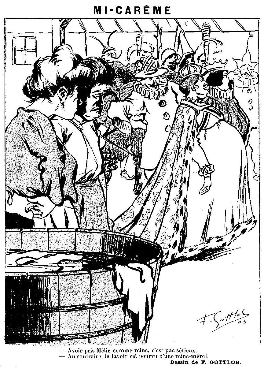 Une reine de lavoir, illustration de la Mi-Carême 1903.